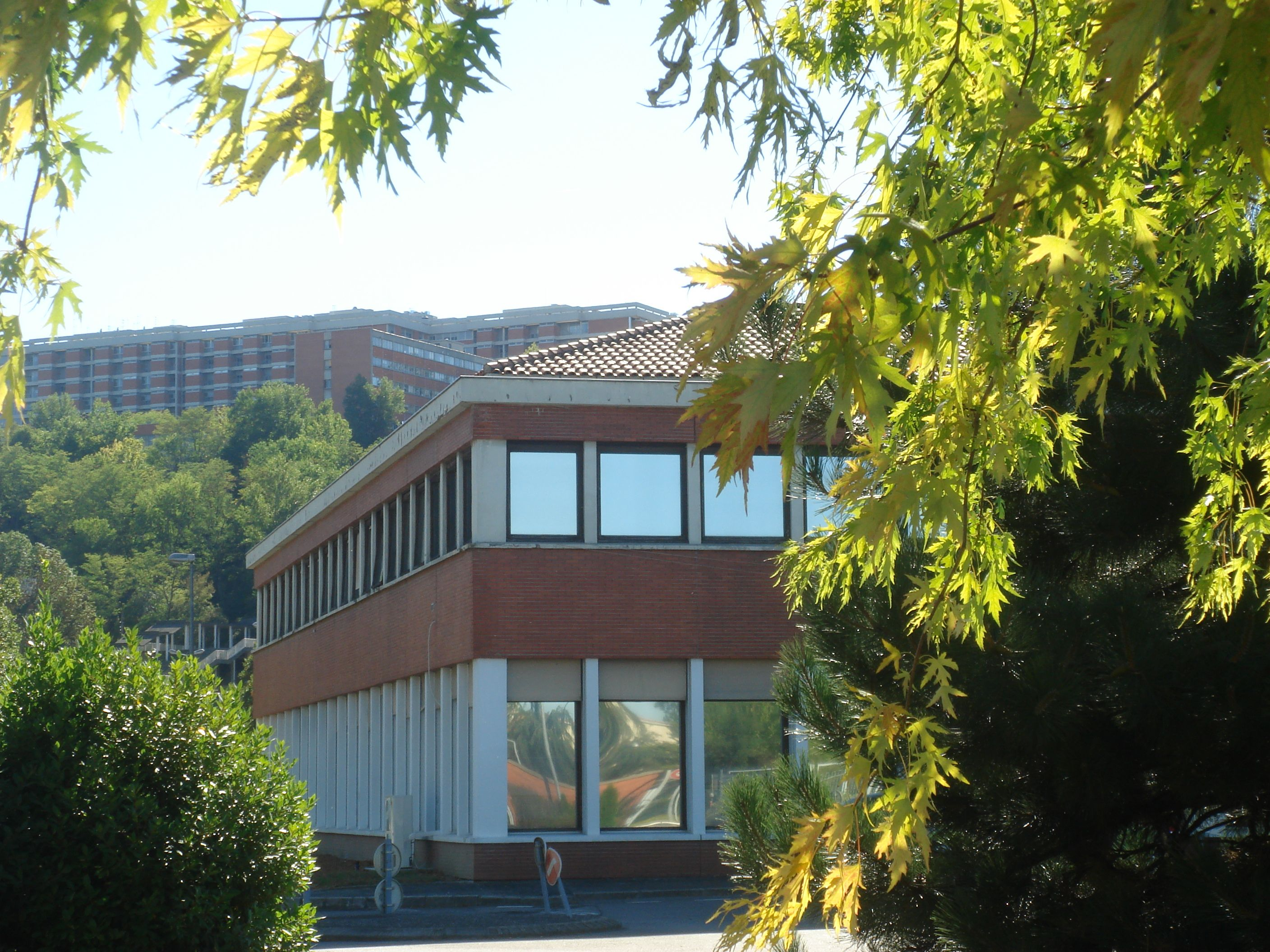 Toulouse (Haute-Garonne, France) : La fac de médecine et l'hôpital sur la butte à Rangueil.